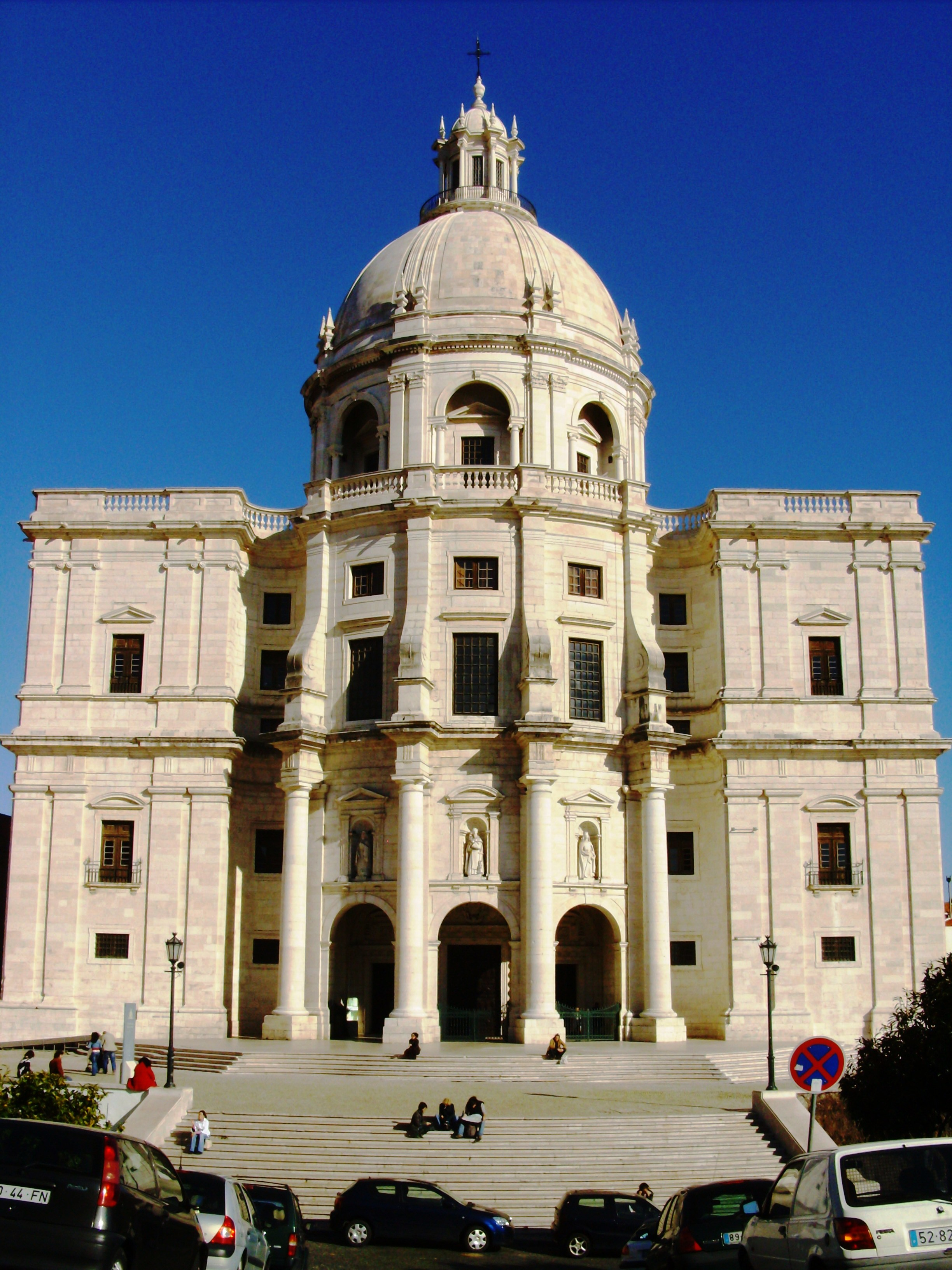 Igreja de Santa Engrácia (Panteão Nacional), Lisboa, Portugal.